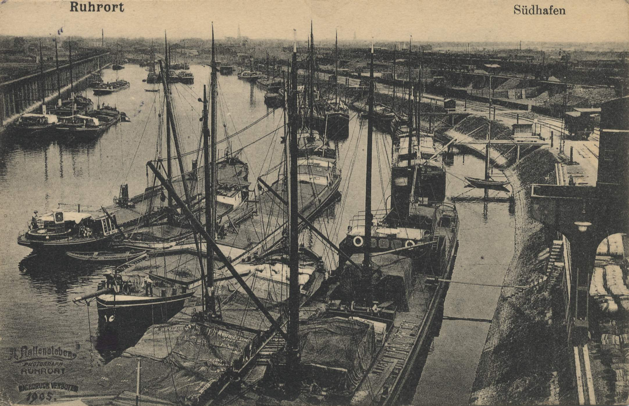 Historische Postkarte von Duisburg von 1905